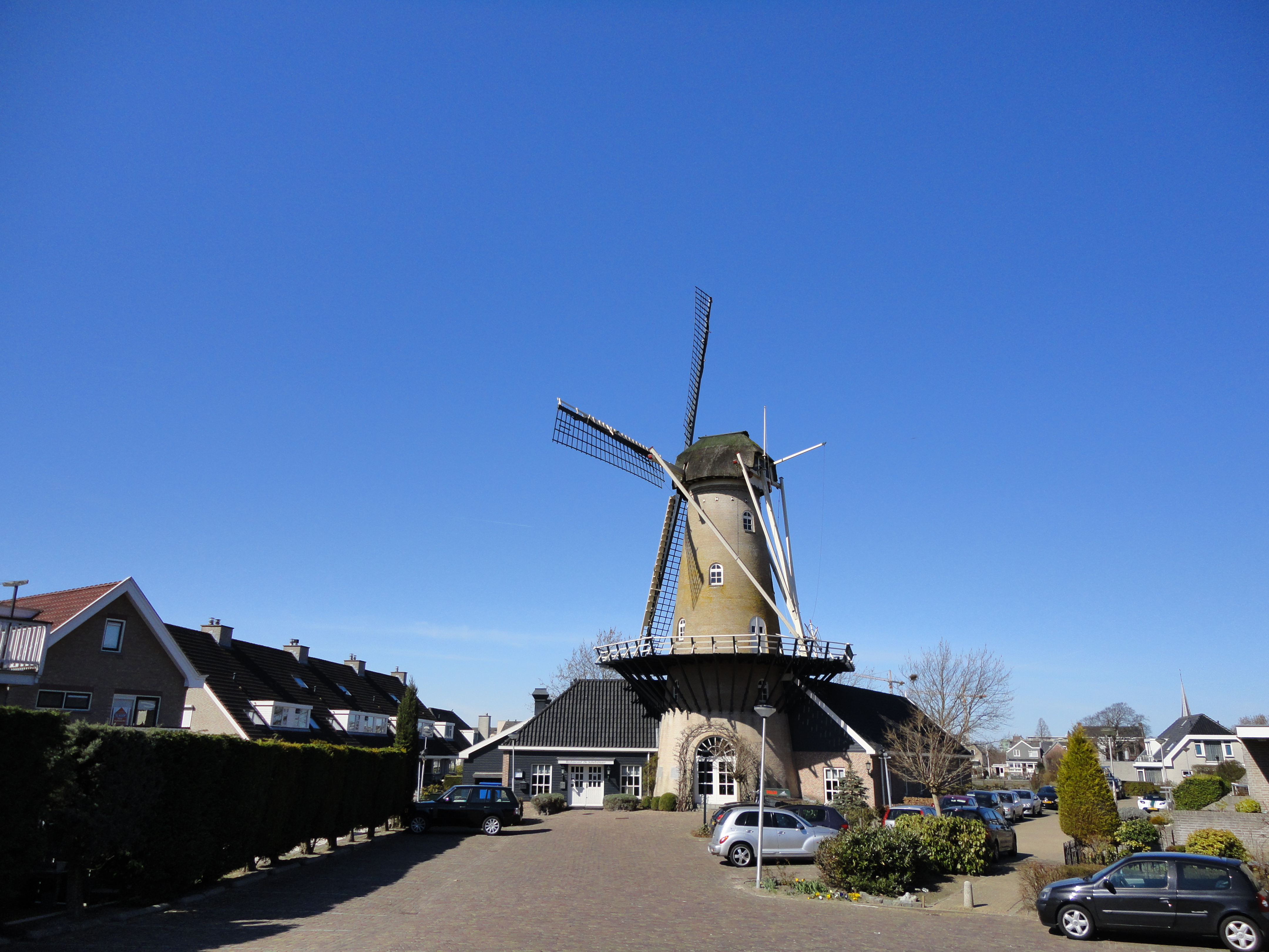 Molen Onverwacht / Schelvenaer 25-03-2012